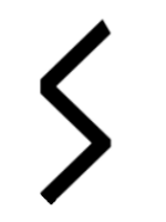 runic letter sowilo, later variant